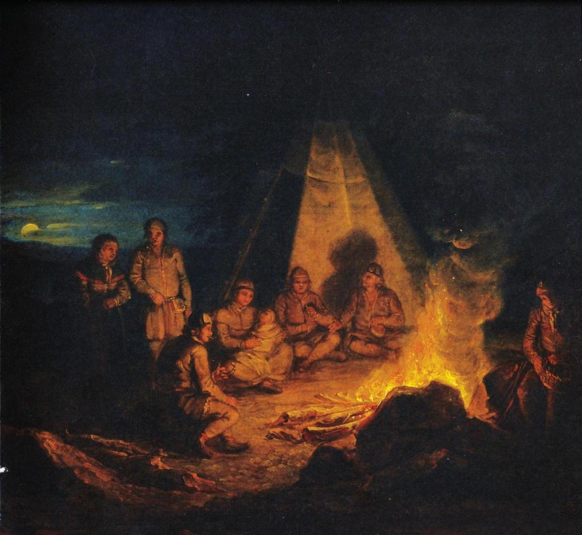 Alexander Lauréuksen maalaus saamelaisista nuotion äärellä (maalauksen yläosa ja vasen reuna puuttuvat). Lauréuksen ei tiedetä koskaan käyneen Lapissa. Maalaus ostettiin Ateneumin taidemuseoon vuonna 1911.